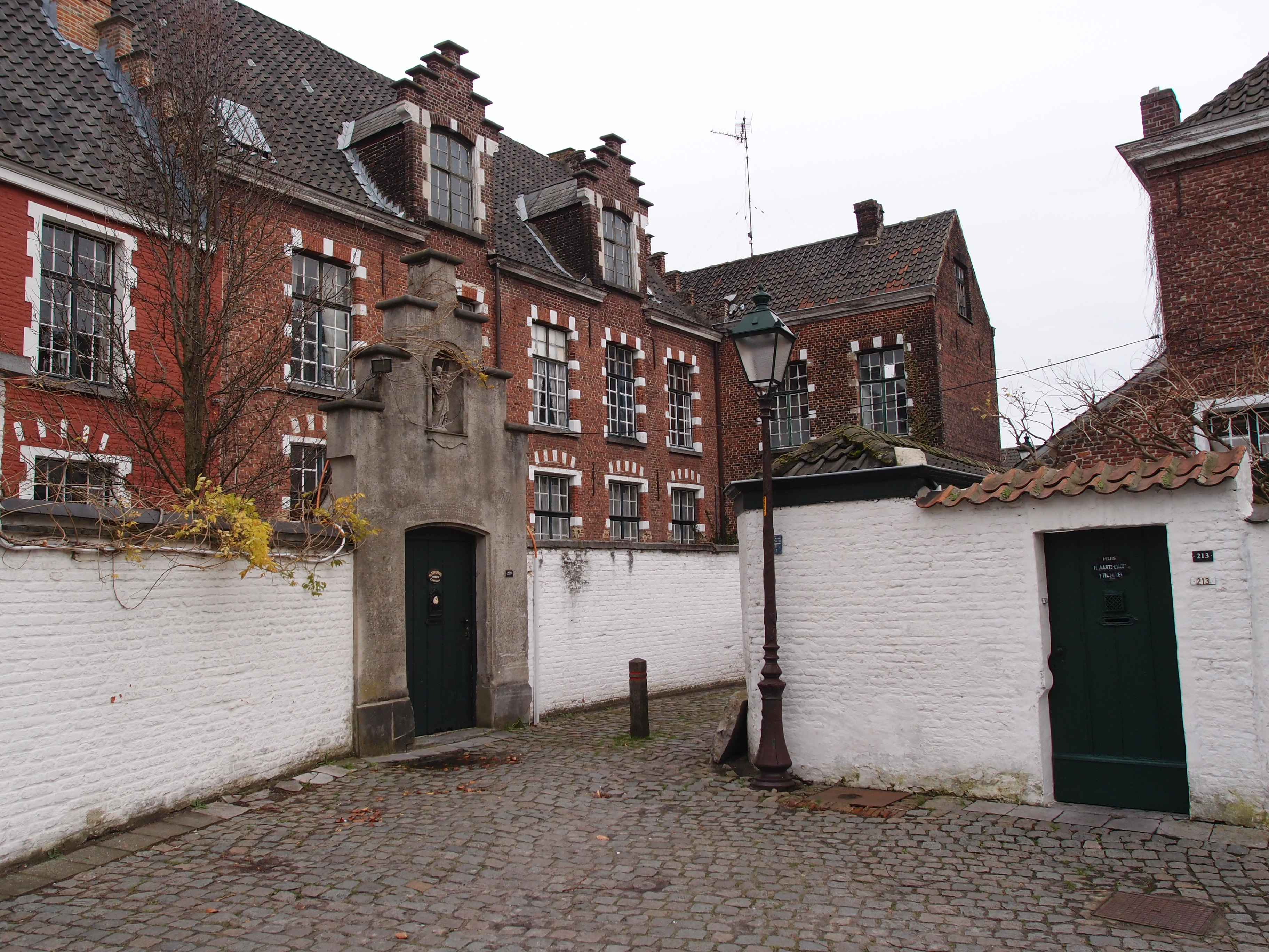 Kleiner Beginenhof ter Hoyen in Gent Datum: 26.01.2014 Urheber: M. Pfeiffer alias Gordito1869 Quelle privates Fotoarchiv des Urhebers